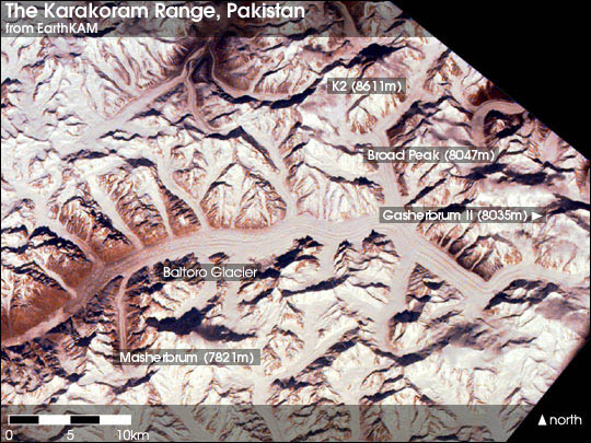 Karakorum